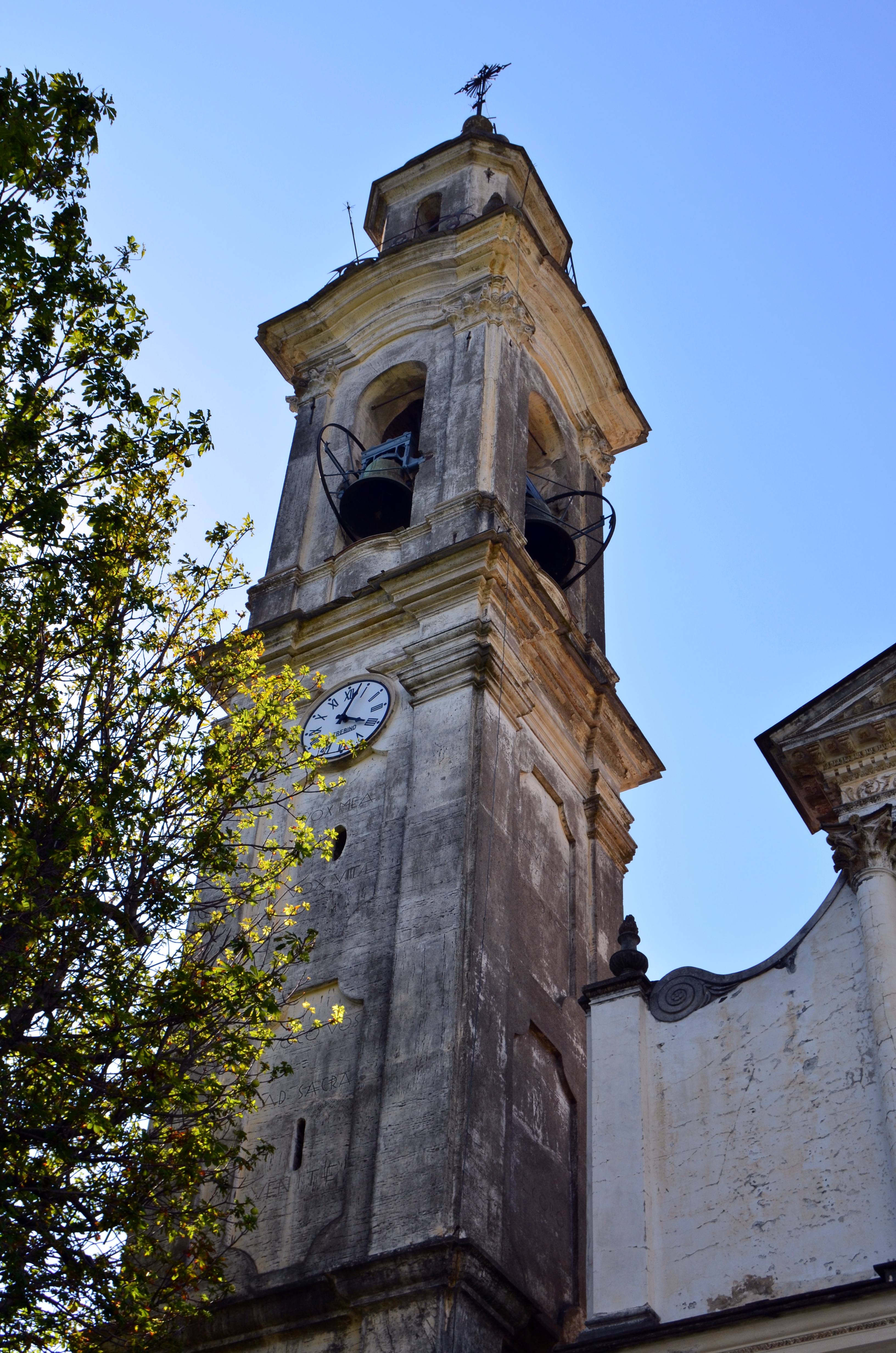 Chiesa di Sant'Andrea di Verzi, Lorsica, Liguria, Italia